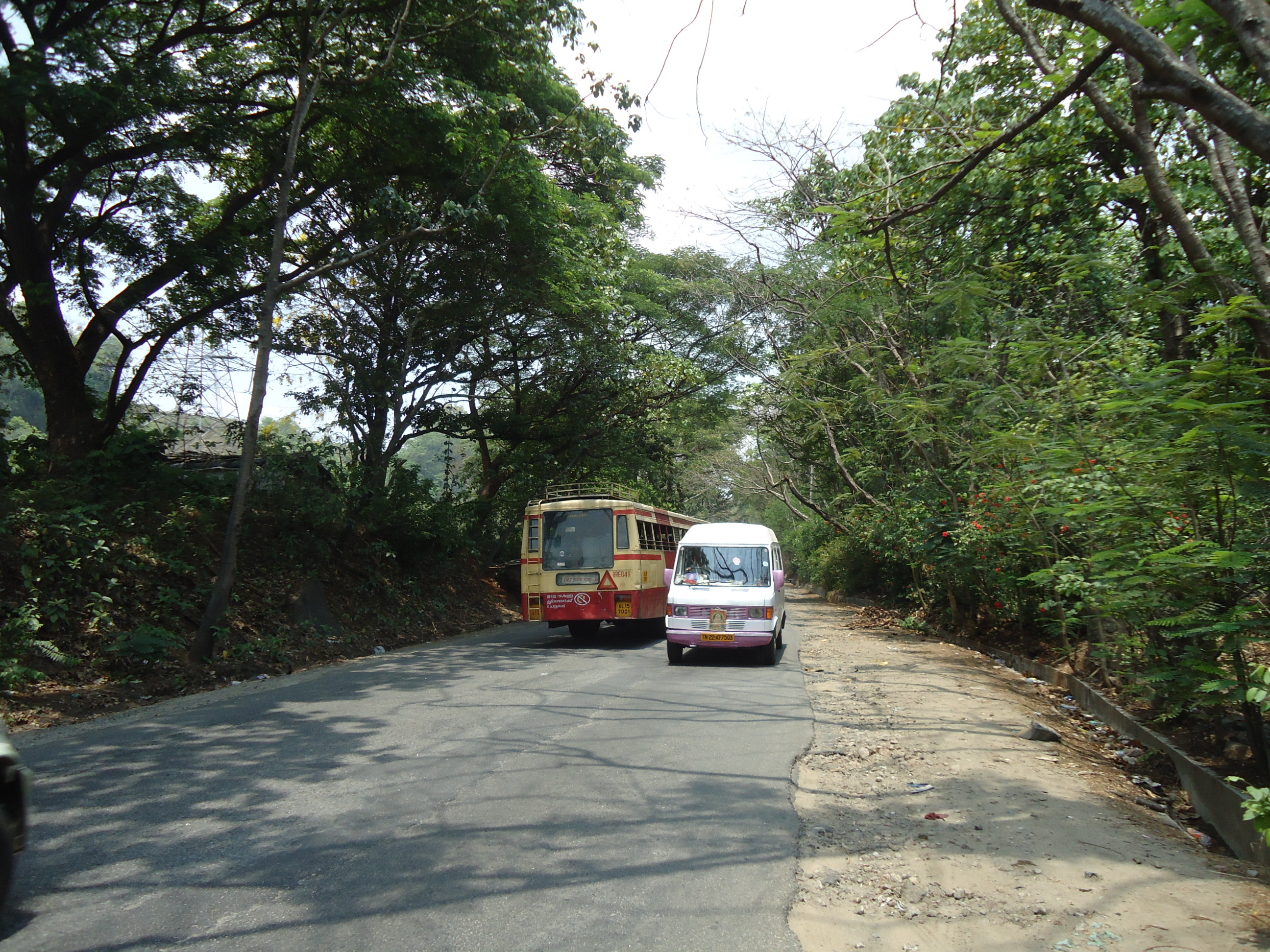 Kuthiranmala road 1